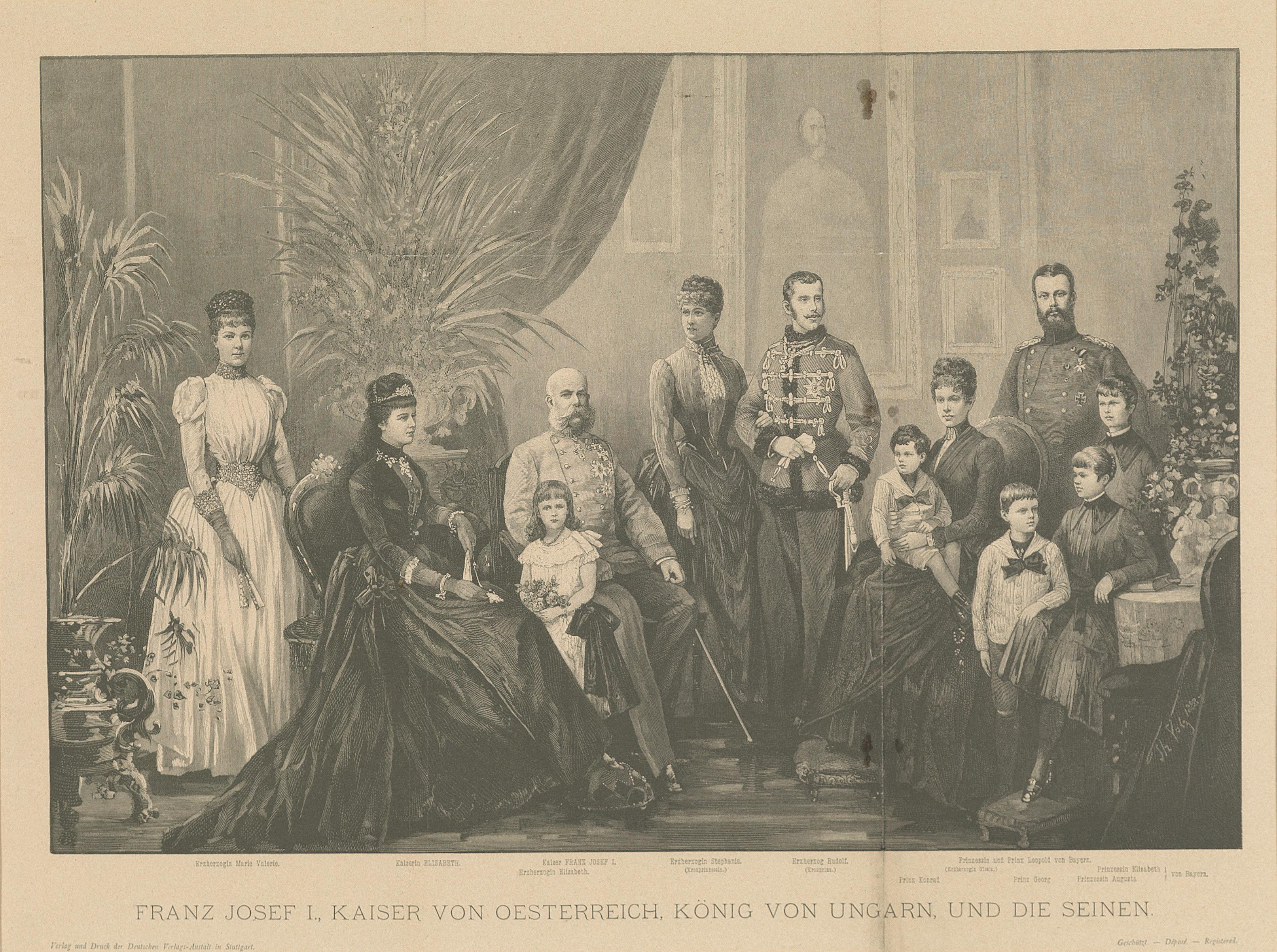 "Franz Joseph I. und die Seinen", Darstellung der gesamten kaiserlichen Familie, Druck der deutschen Verlagsanstalt Stuttgart, 45,5x 30,5 cm Marie Valerie, Kaiserin Elisabeth, Erzherzogin Elisabeth, Kaiser Franz Joseph, Erzherzogin Stephanie, Erzherzog Rudolf, Prinz Konrad (* 1883), Prinzessin Gisela und Prinz Leopold von Bayern, Prinz Georg, Prinzessin Elisabeth Marie von Bayern (oben), Prinzessin Augusta Maria von Bayern (unten)